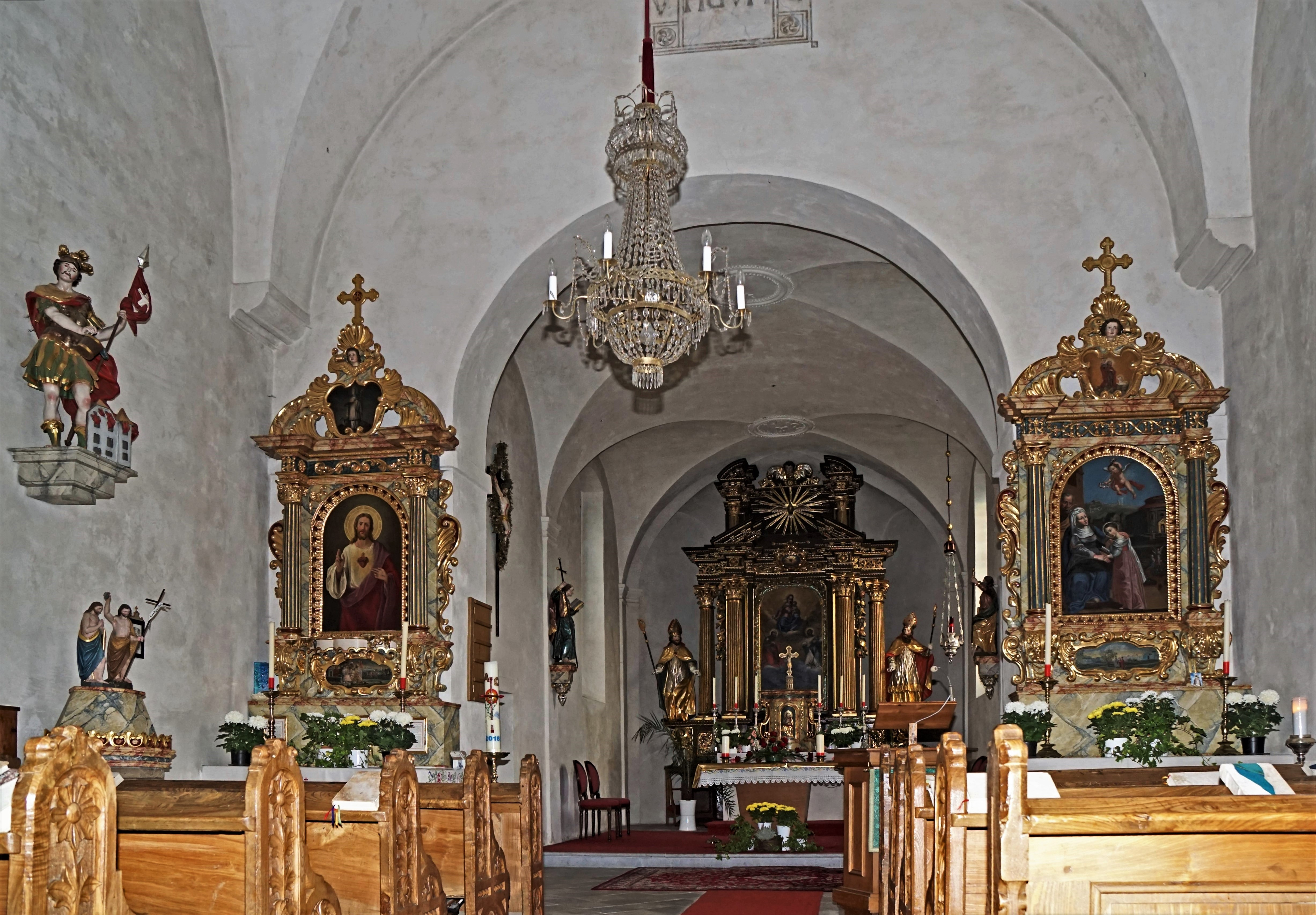 Kath. Pfarrkirche St. Philipp und St. Jakob (Arriach), Innenansicht